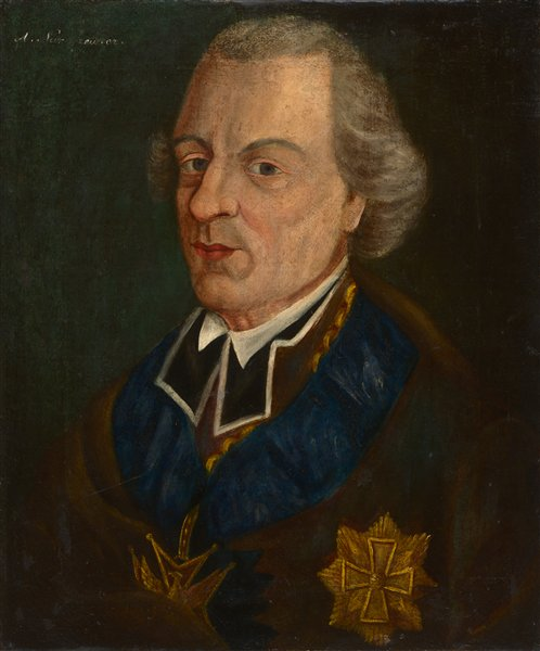 Беларуская (тарашкевіца): Партрэт Адама Нарушэвіча (Adam Naruševič)